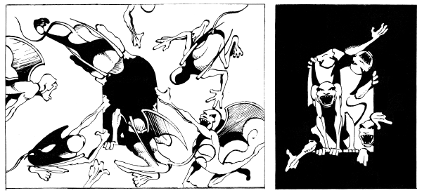 Nicolas Križan, del av serien "Night". Denna tidiga fantasyserie (med demoner, hotad dam och Conan-lik hjälte) tecknades 1979 och publicerades i fanzinet Privata Serier 1, sid 18 (1982).